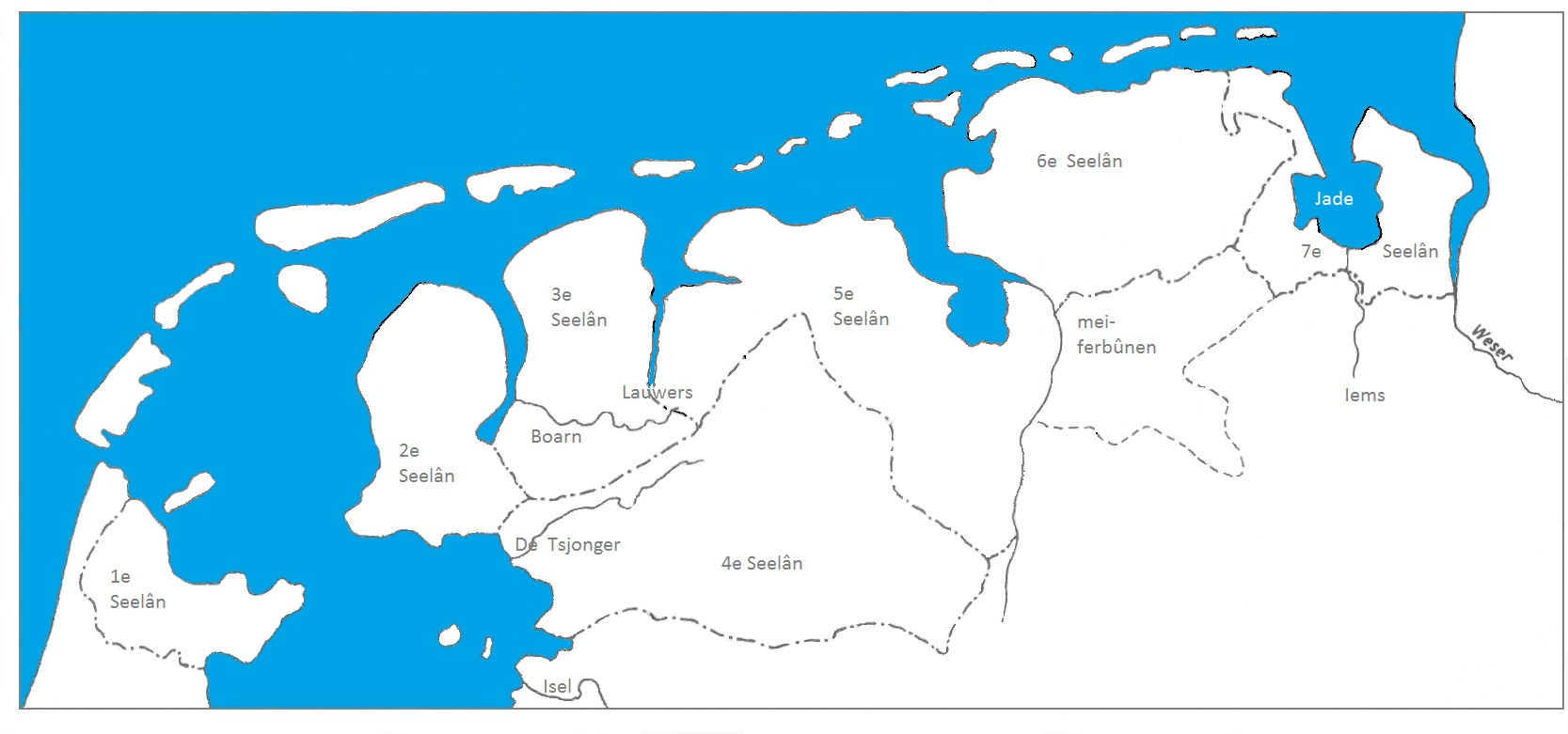 Sân Fryske Seelannen neffens it traktaat fan 1417